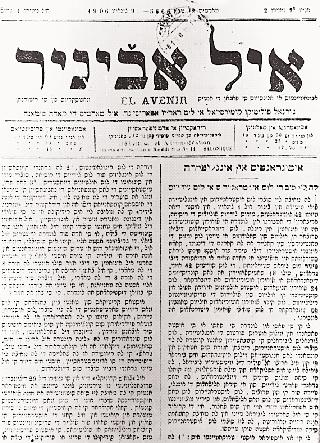 Главата на вестник "Авенир".